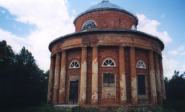 Православный храм в селе Брынь Думиничского района Калужской области.